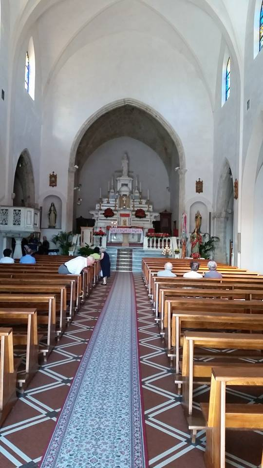 navata centrale della chiesa di S. Sabina a Pattada